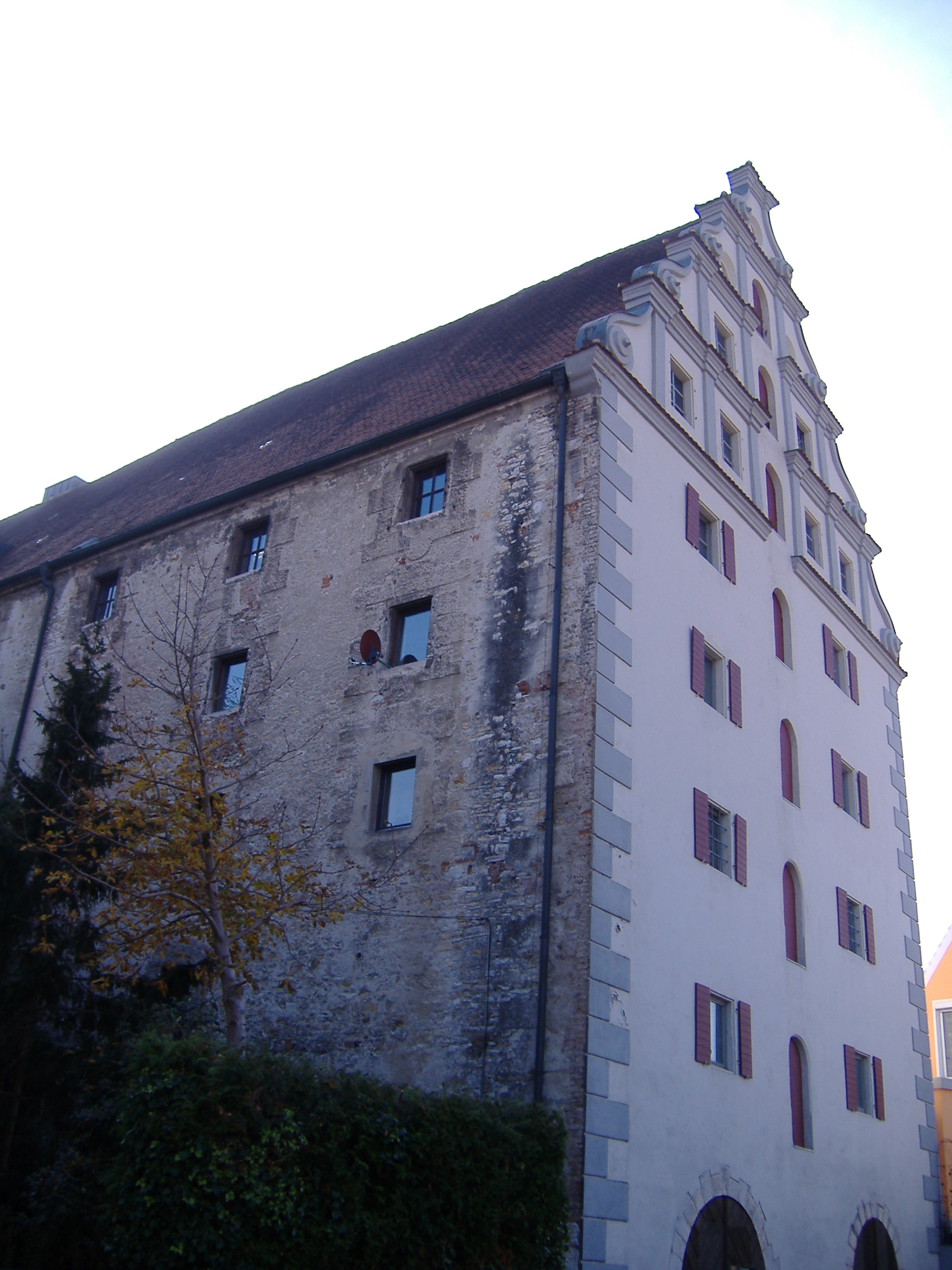 Höchstädt